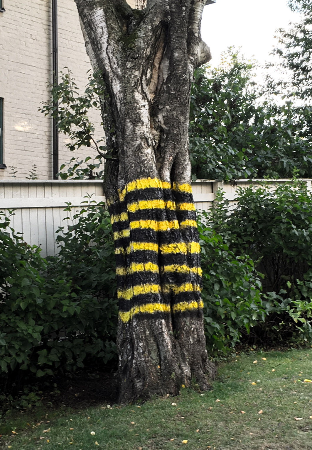 Promenadorquestern och med baletten palettens träd utanför kårhuset Nymble vid Kungliga Tekniska Högskolan, Stockholm